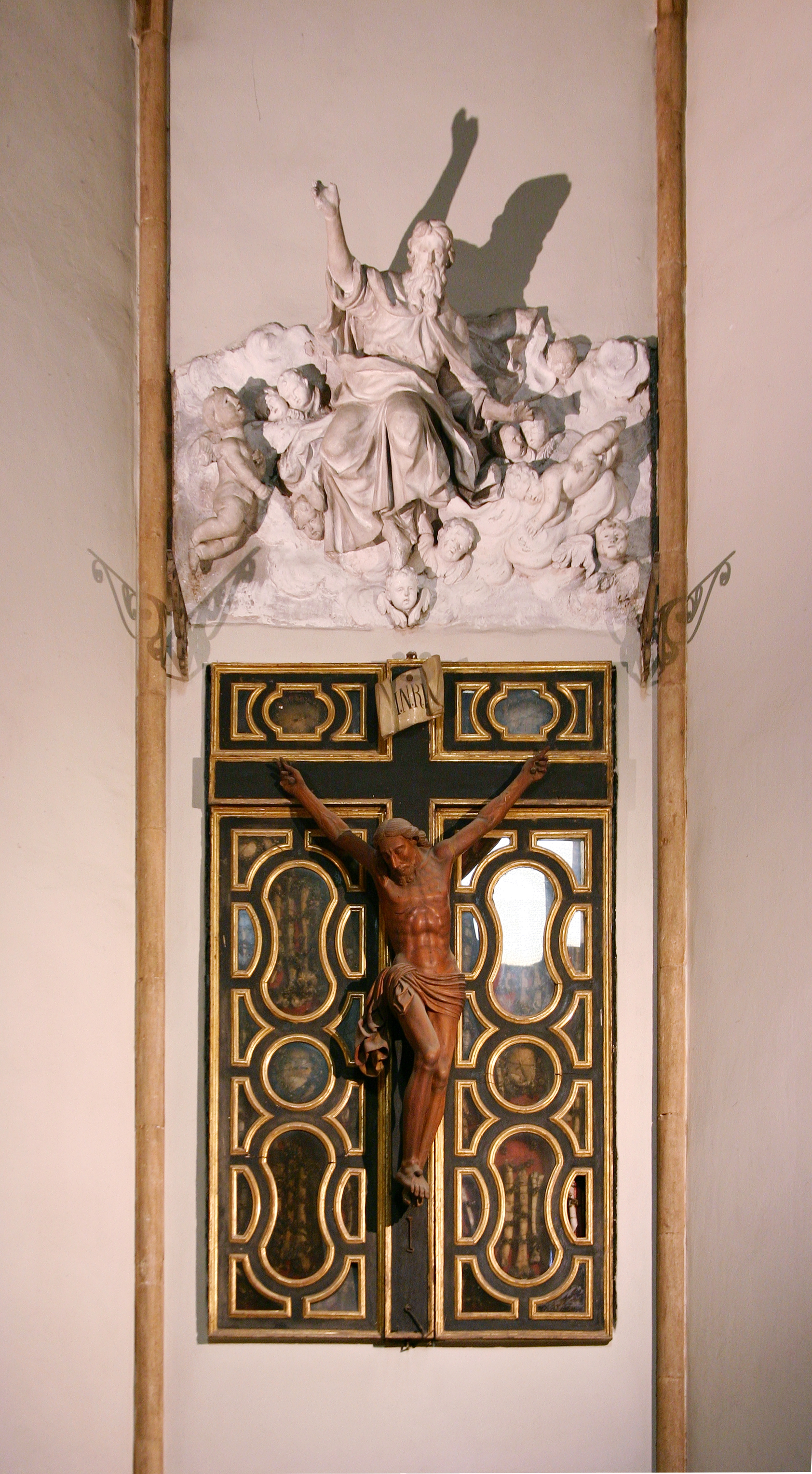 Santa Maria della Catena